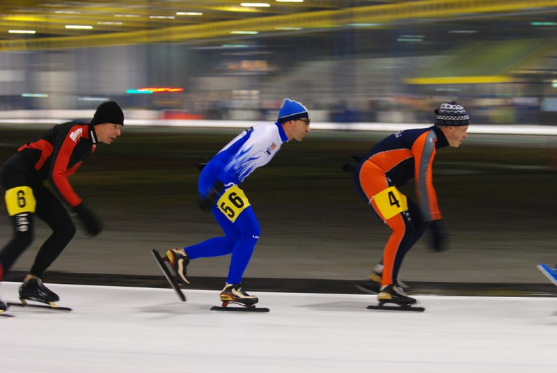 Marathonschaatsen